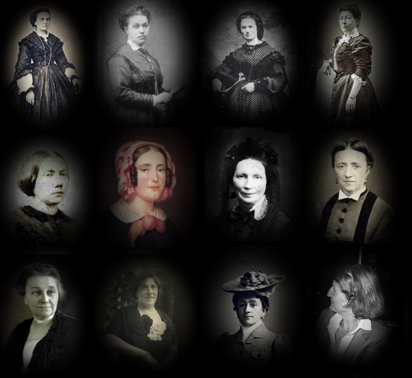 Portretten van twaalf Regout-vrouwen. Voor deze montage is gebruik gemaakt van rechtenvrije afbeeldingen op Wikimedia Commons: File:Gertrudis Hubertina Amelia Regout-Polis (1830-1904).jpg File:Léonie_Regout-Regout_(1837-1906).jpg File:Pauline Regout (1837-1864).jpg File:Louise Regout-Pétry (1849-1916).jpg File:Emilie Brouwers-Regout (1834-1886).jpg File:Aldegonda Hoeberechts (1798-1878).jpg File:Jeannette Regout-Ghysen (1812-1894).jpg File:Théodosie Regout-Kersten (1829-1892).jpeg File:Bertha Melanie Josephine Regout-Stevens (1870-1959).jpg File:Sophie Regout-van der Does de Wiilebois (-1939).jpg File:Maxime Regout (1864-1906) & Anna Rutten (1865-1917).jpg File:MdeWijkerslooth.jpg